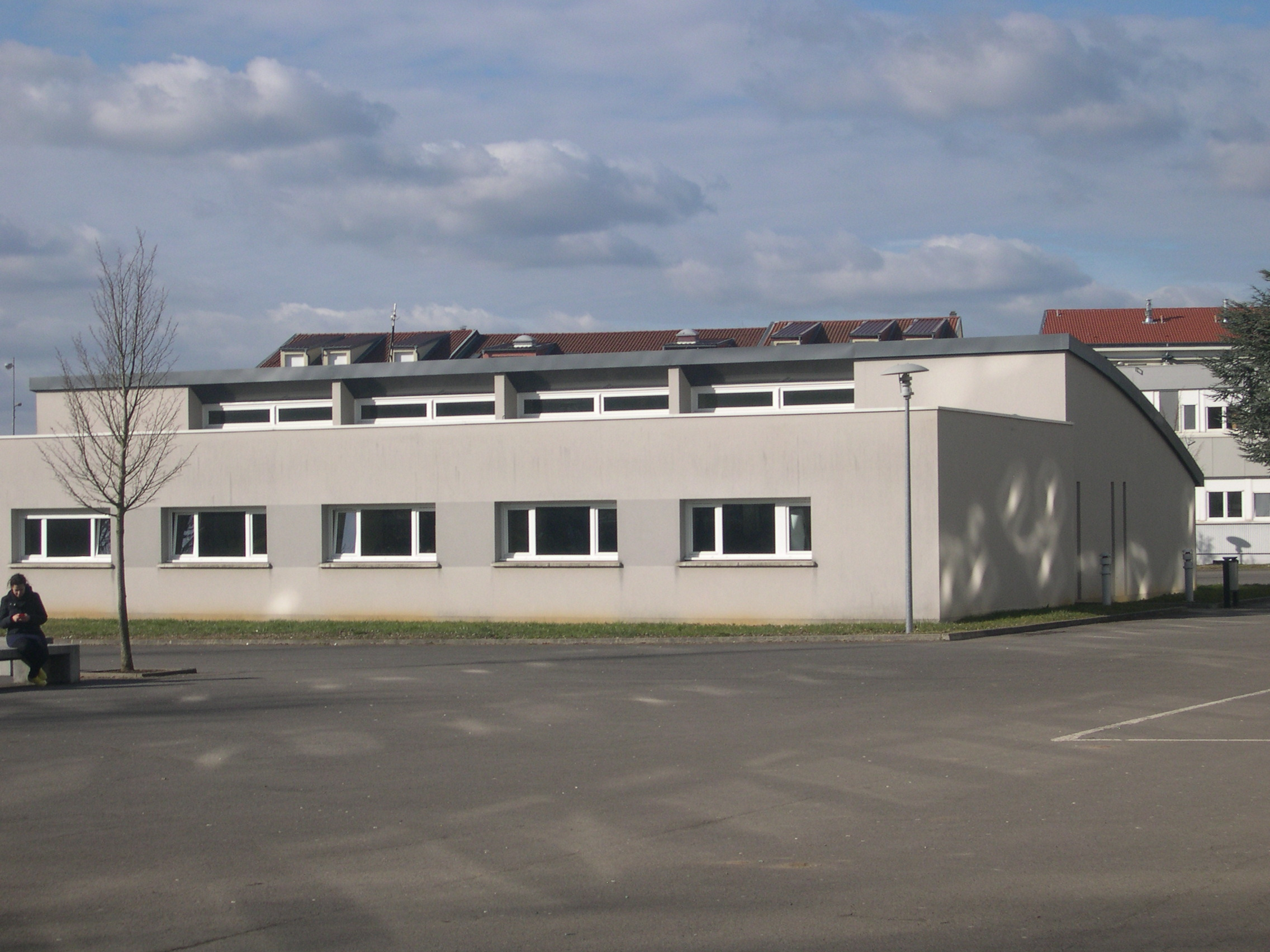 CDI du lycée St Exupéry Fameck